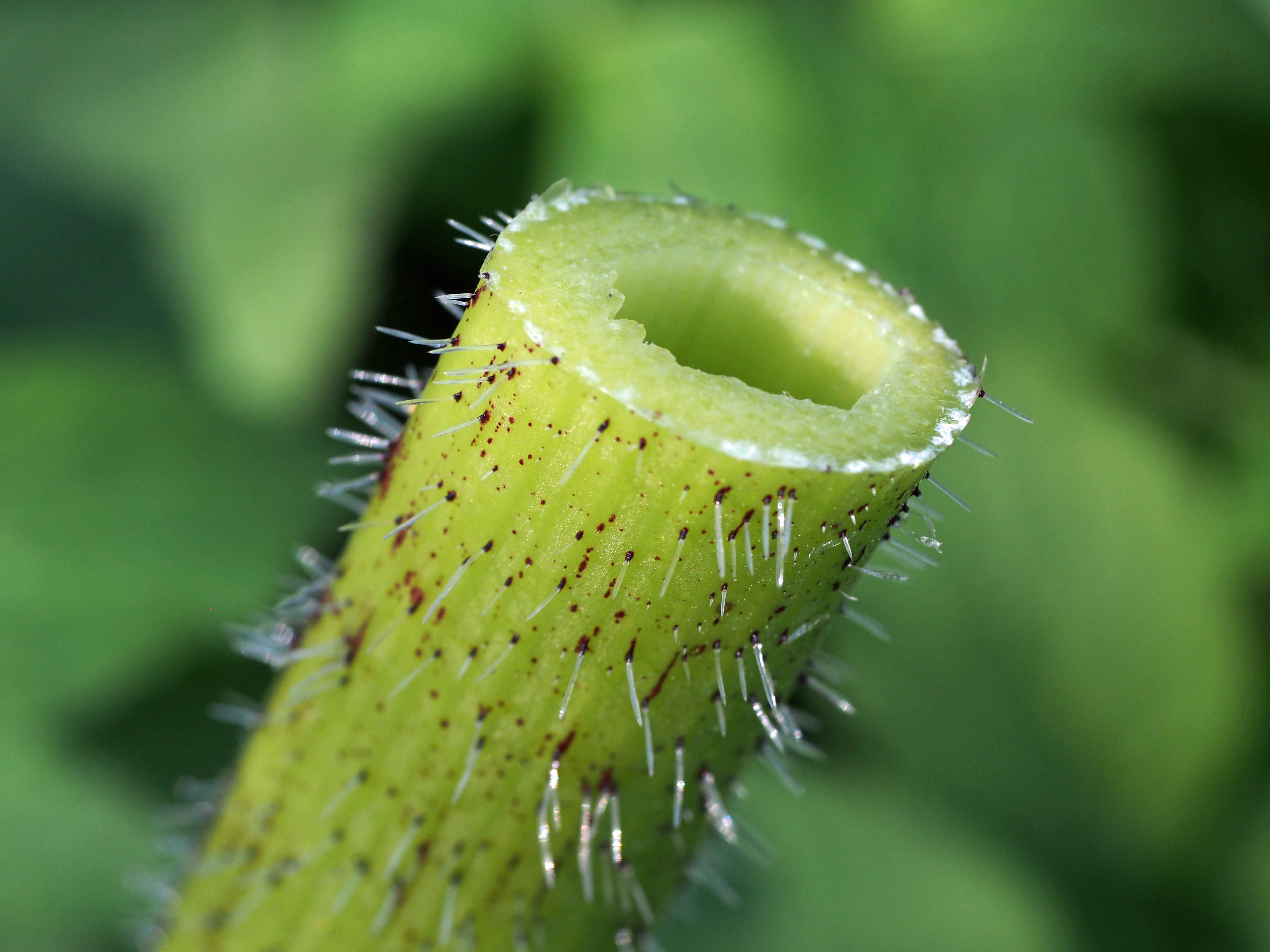 Stängel des Riesen-Bärenklau (Heracleum mantegazzianum), charakteristisch: kaum gefurcht und purpurne Flecken.